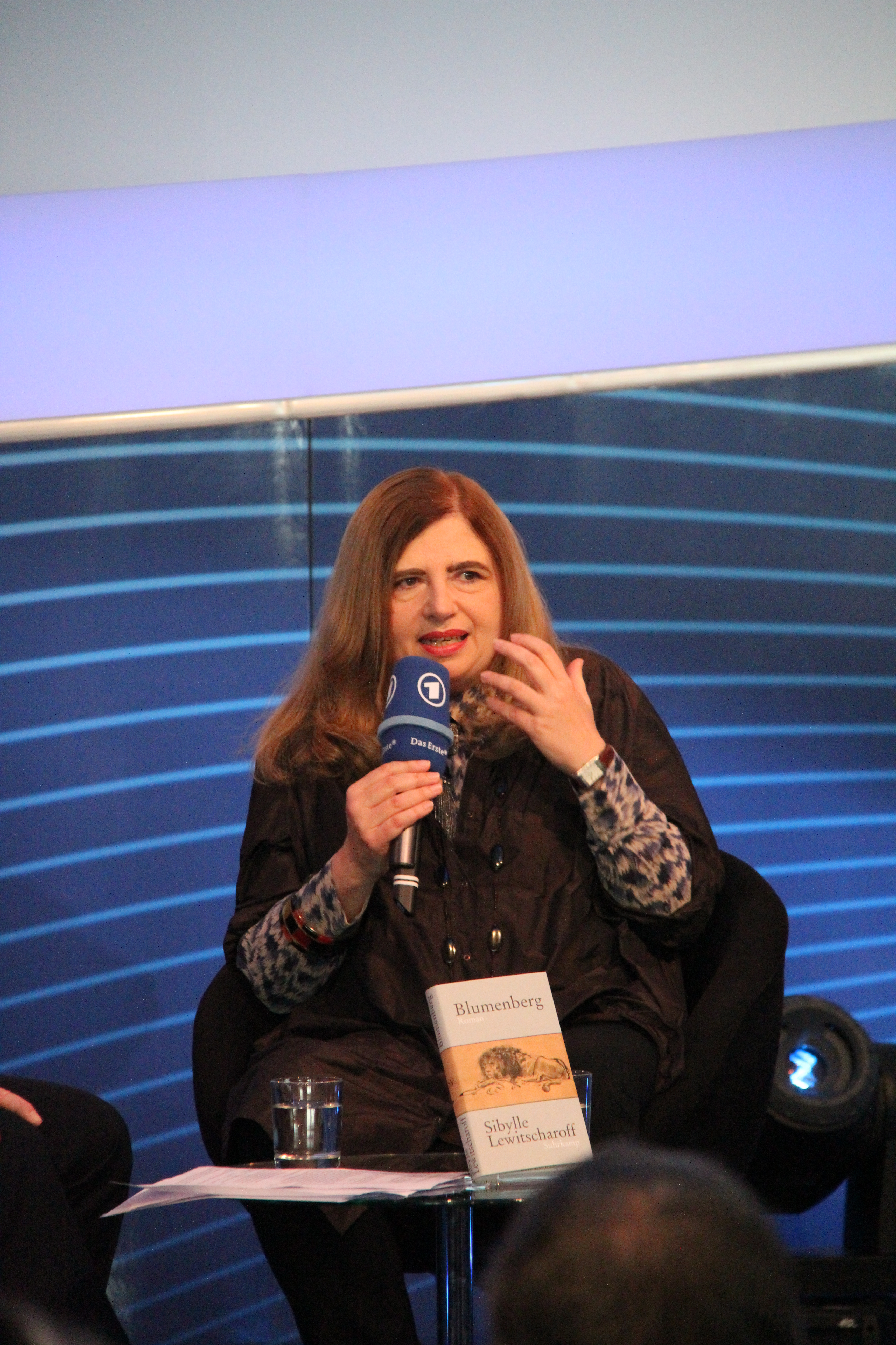 Sibylle Lewitscharoff auf der Frankfurter Buchmesse 2011